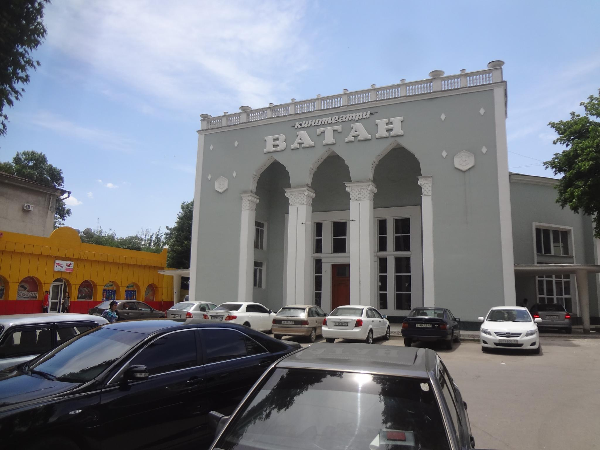 Dushanbe, Tajikistan